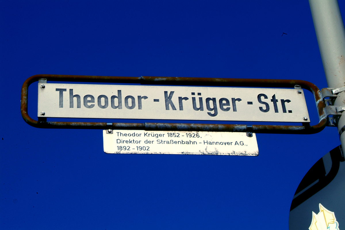 Theodor Krüger war Direktor der Straßenbahn Hannover (heute: üstra Hannoversche Verkehrsbetriebe AG.